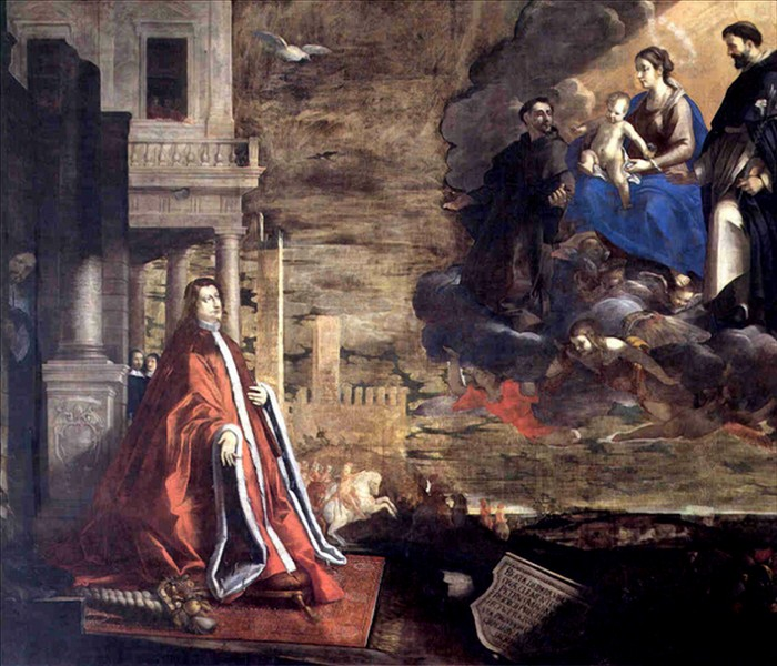 La glorificazione del podestà Piero Morosini.